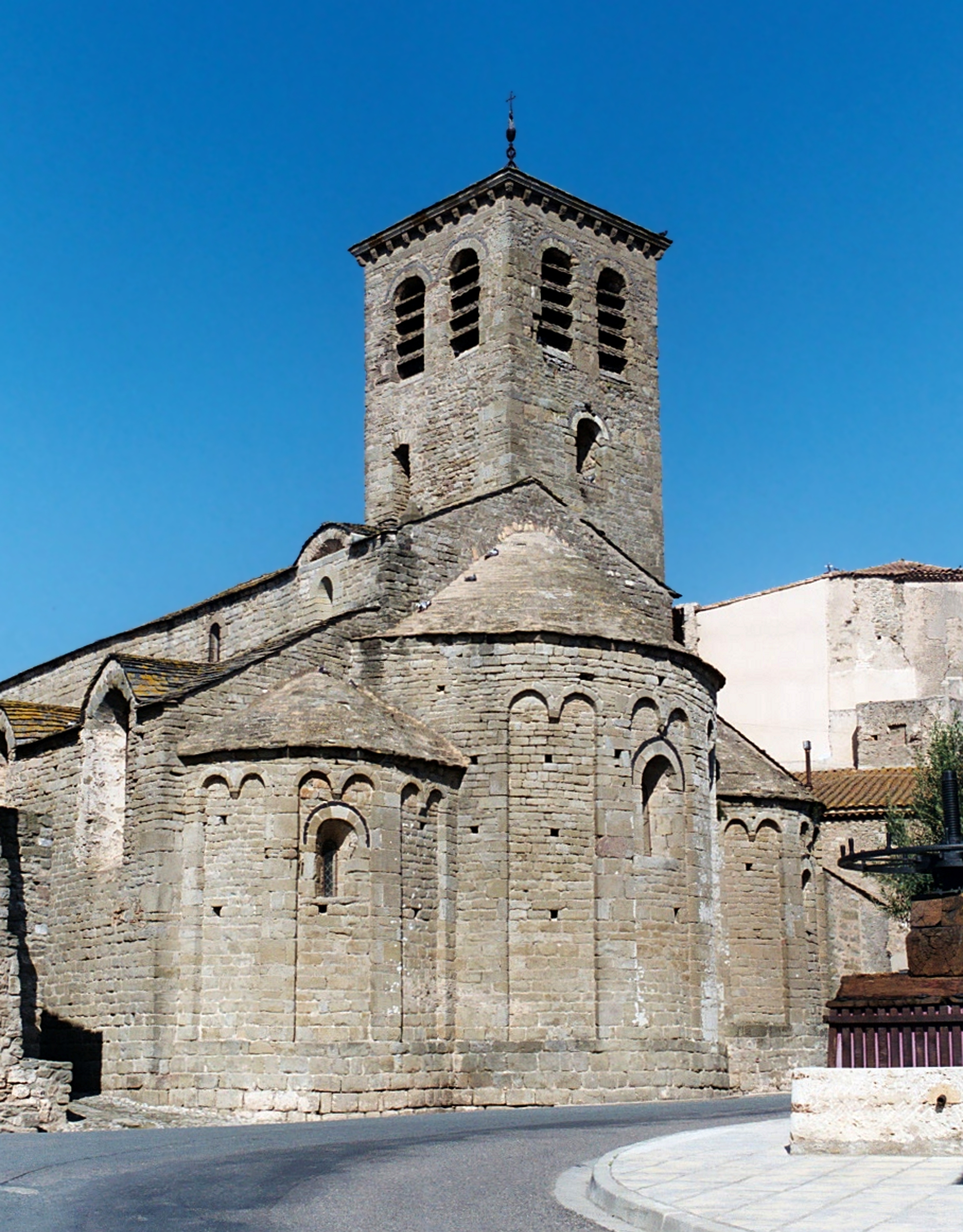 France - Languedoc - Aude - Église Saint-Martin d'Escales